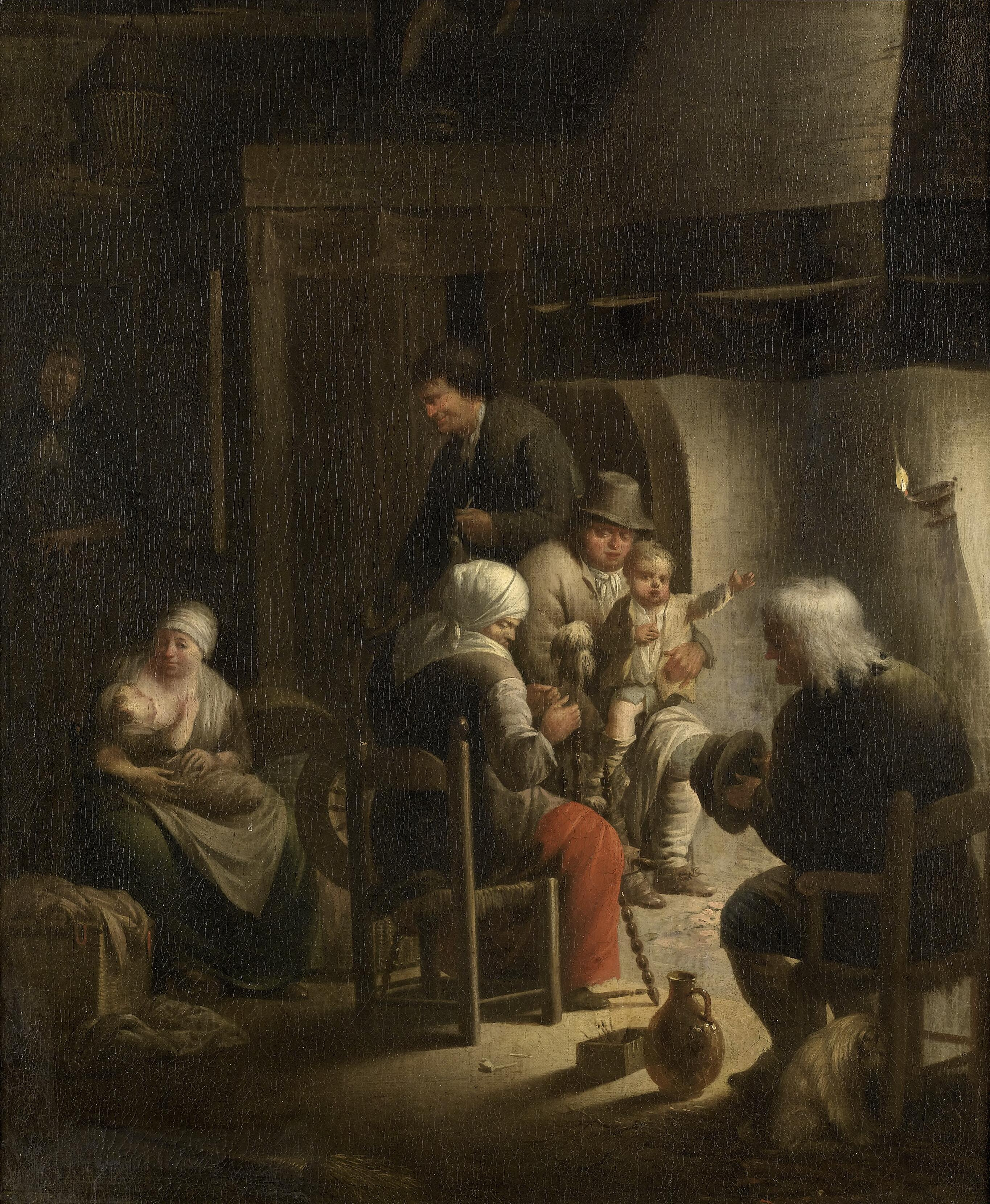 Ynterieur mei in boerefamylje om de hurd